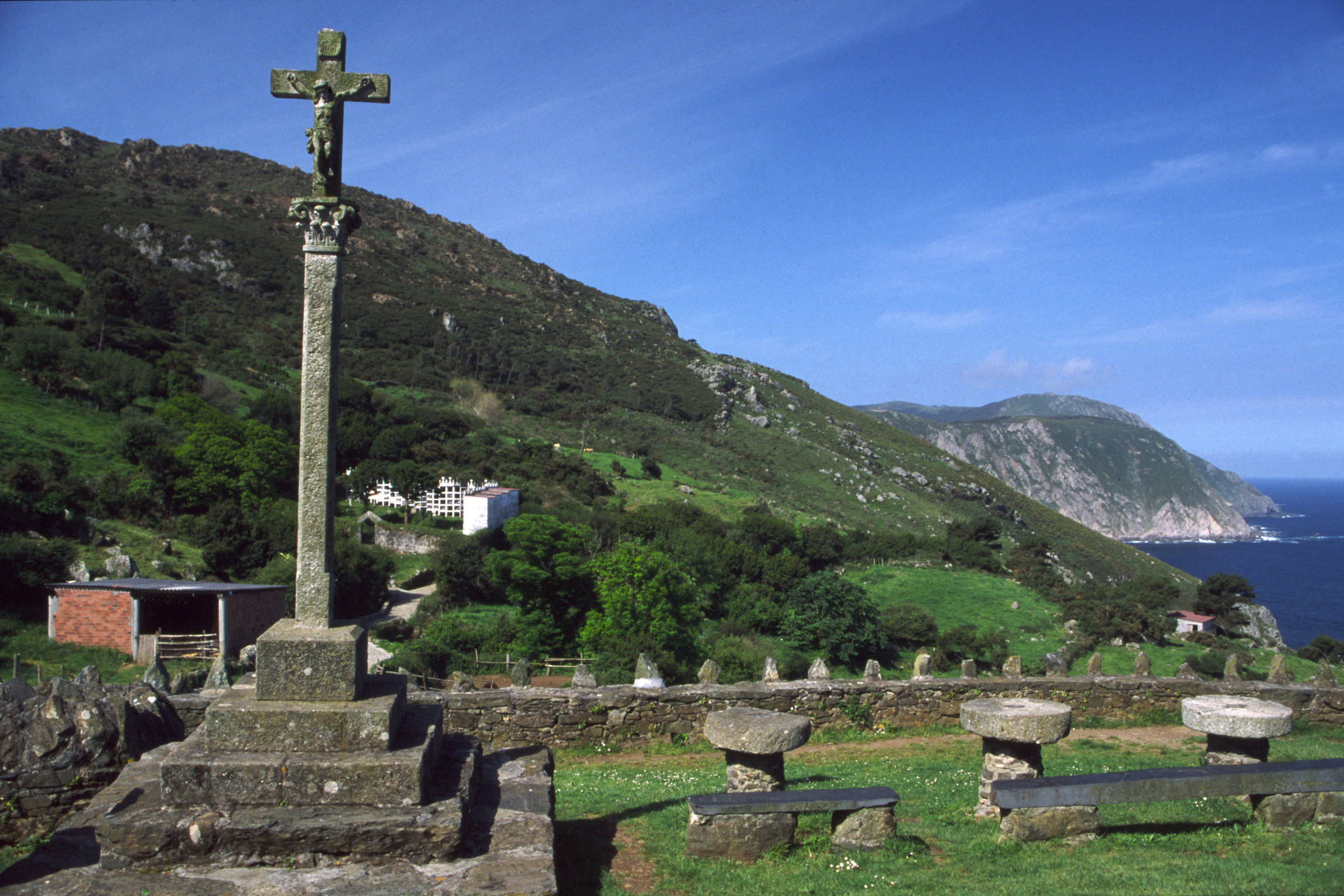 Cruceiro de Santo André de Teixido - Cedeira - A CoruñaSan Andrés de Teixido